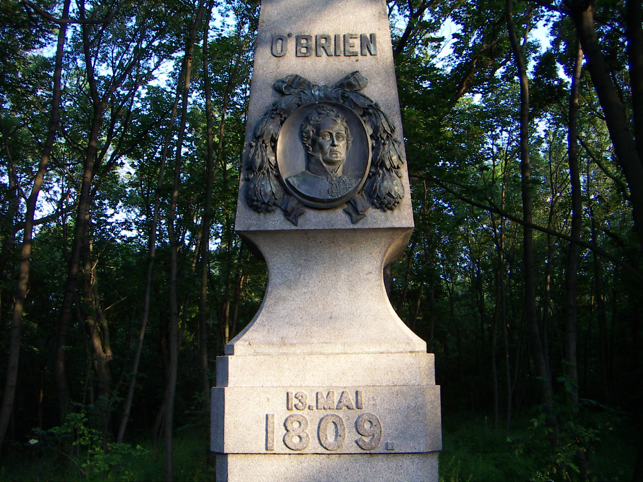 Johann Freiherr von O'Brien, 1775-1830, Denkmal, Jedlesee, Vienna